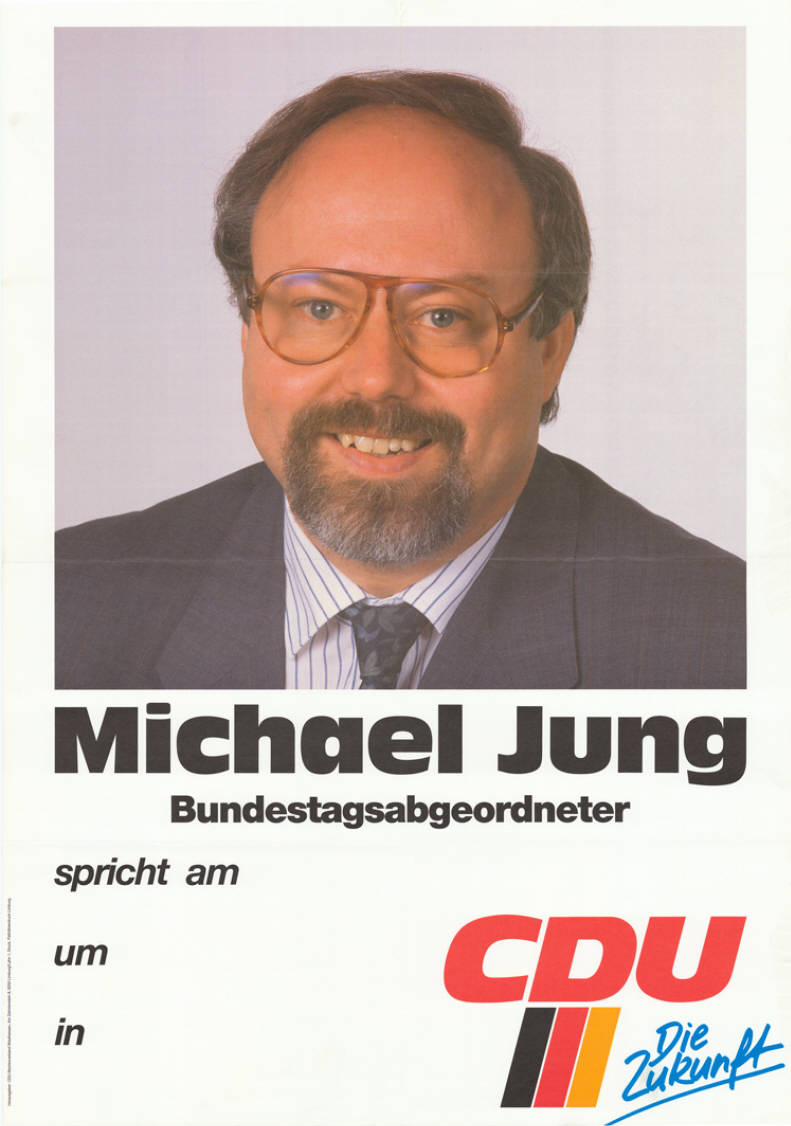 Michael Jung Bundestagsabgeordneter spricht am um in CDU Die Zukunft Abbildung: Porträtfoto Plakatart: Ankündigungsplakat Auftraggeber: CDU-Bezirksverband Westhessen, Limburg/Lahn Drucker_Druckart_Druckort: Pallottinerdruck Limburg Objekt-Signatur: 10-001 : 3007 Bestand: Plakate zu Bundestagswahlen ( 10-001) GliederungBestand10-18: Plakate zu Bundestagswahlen (10-001) » Die 11. Bundestagswahl am 25. Januar 1987 » CDU » Ankündigungsplakate Lizenz: KAS/ACDP 10-001 : 3007 CC-BY-SA 3.0 DE